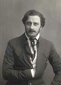 Vasily Kachalov, imagine din 1917